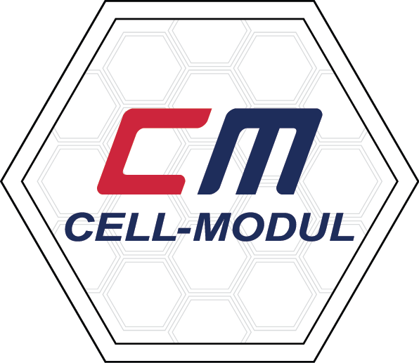 Cell-Modul Kft. Logó